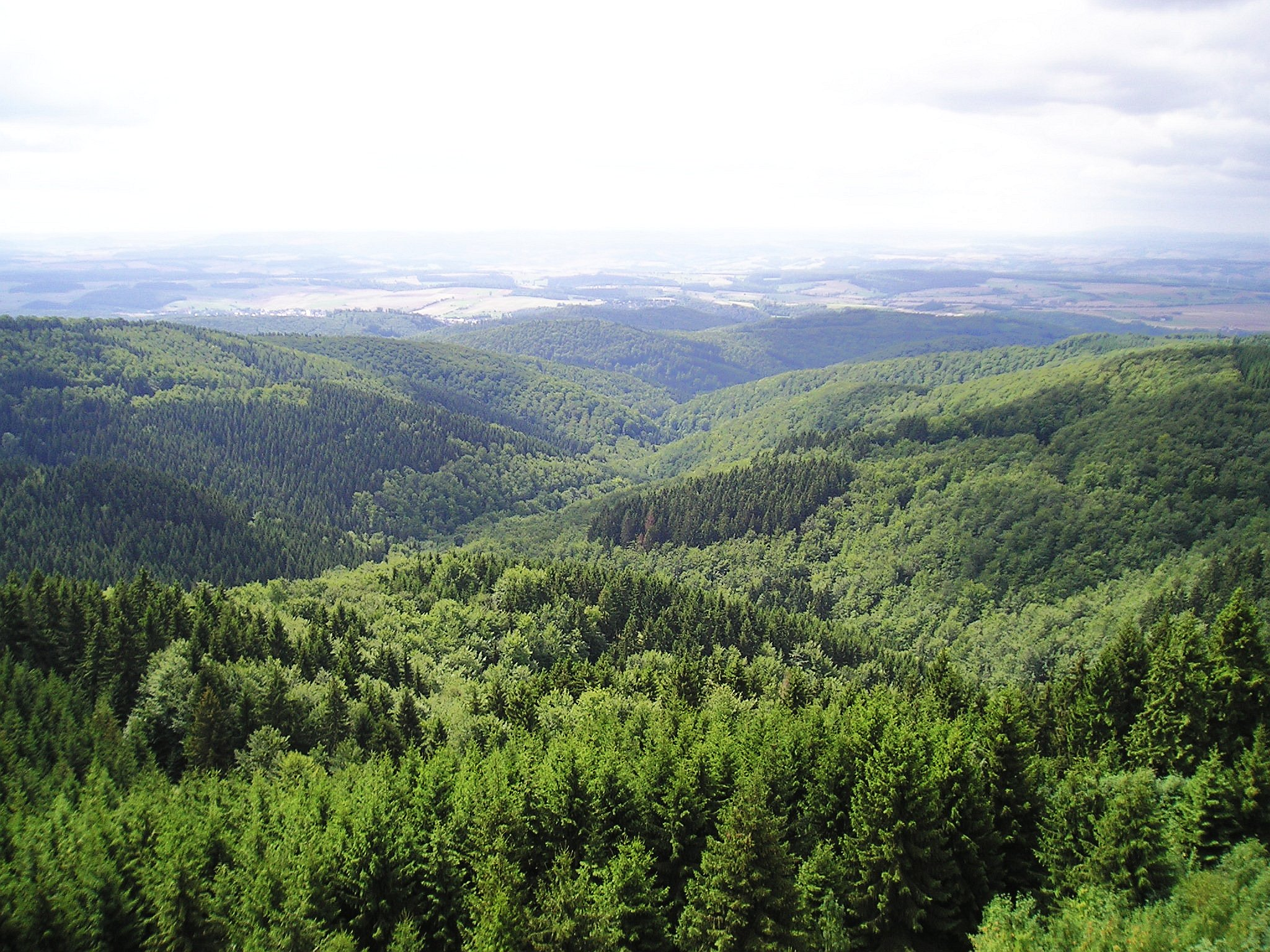 Ausblick vom Grossen Knollen (Turm)